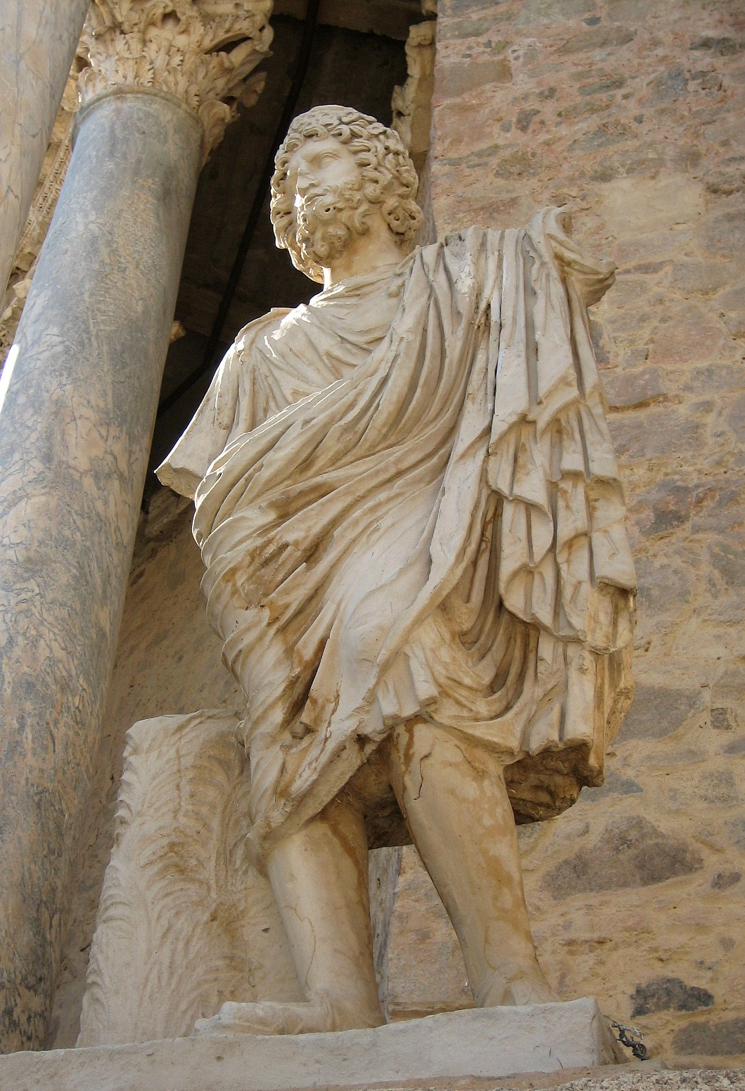 reproduction d'une statue dont l'original se trouve au musée d'art romain de Merida